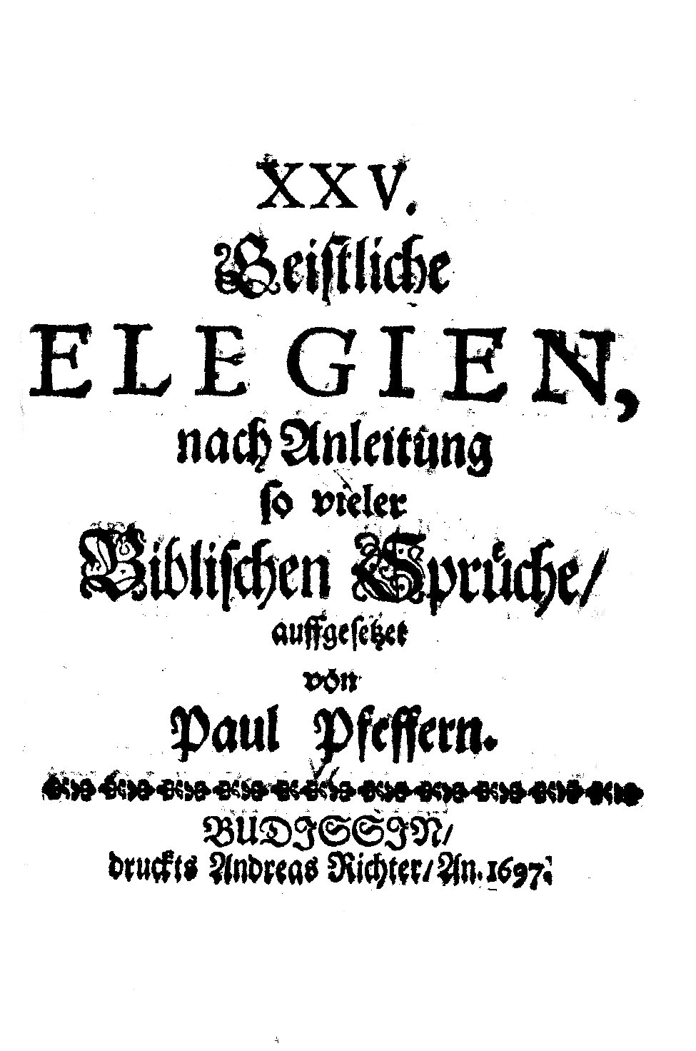 Titelblatt: XXV. Geistliche Elegien, nach Anleitung so vieler Biblischer Sprüche auffgesetzt. Budissin : Richter, 1697